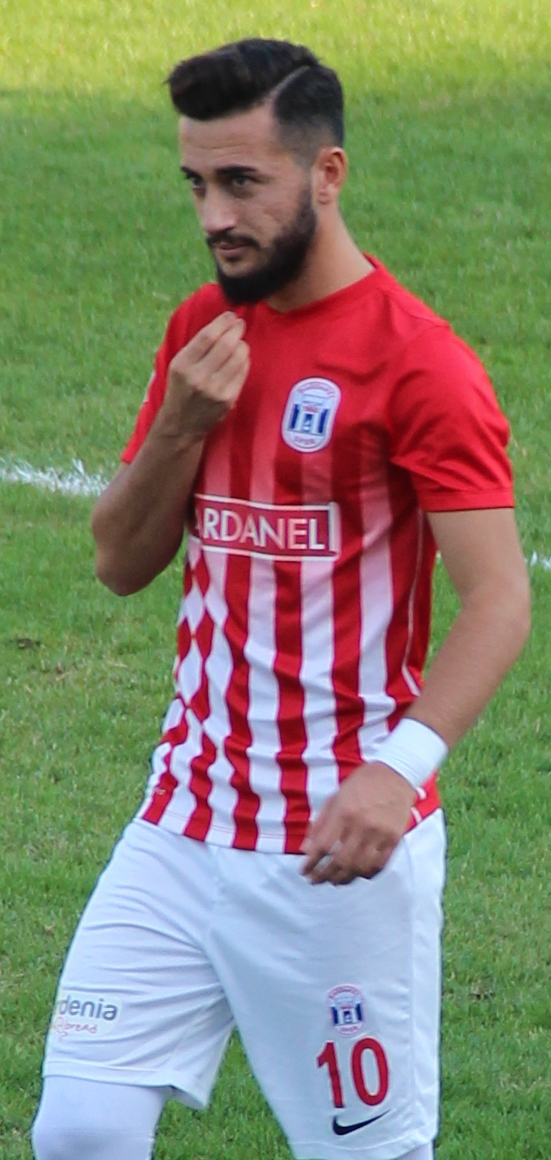 Derincespor 53 - İlker Günay, 3 - Deniz Durmuş, 41 - Zafer Doğan, 61 - Emre Kaba, 95 - Abdülkadir Kaba, 8 - Samet Gül, 14 - Aykut Köz, 37 - Ahmet Güney, 73 - Raif Gündoğdu, 1 - Murat Aydın, 10 - İbrahim Gürel Yedekler: 21 - Özal Keklik, 22 - Onur Demir, 42 - Alperen Öğdüm, 70 - Cem Aktaş, 93 - İsmail Dalkıran, 7 - Emre Kürküt, 17 - Hasan Ali Durtuluk Teknik Direktör: Ali Asım Balkaya Dardanelspor 90 - Ceyhun Demircan, 2 - Sinan Akgöl, 17 - Bedri Evren, 20 - Ahmet Sönmez, 23 - Ahmed Emir Tekçam, 5 - Can Morgül, 7 - Batuhan Irmak, 21 - Ömer Sümer, 98 - Mertcan Dursun, 9 - Uğur Uğur, 14 - Ufukcan Engin Yedekler: 41 - Enes Fidayeo, 61 - Yusuf Bayram, 63 - Samed Altundağ, 10 - Nuri Fatih Aydın, 19 - Selim Asal, 25 - Fırat Aras, 51 - Serkan Çelik Teknik Direktör: Önder Karaveli